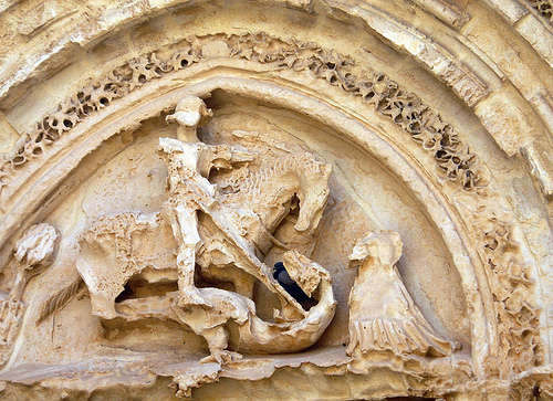 Dettaglio del portale di San Giorgio (Ragusa)